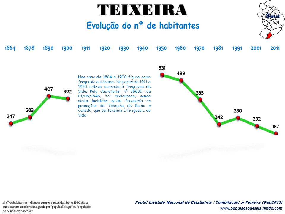 Evolução da População 1864 / 2011